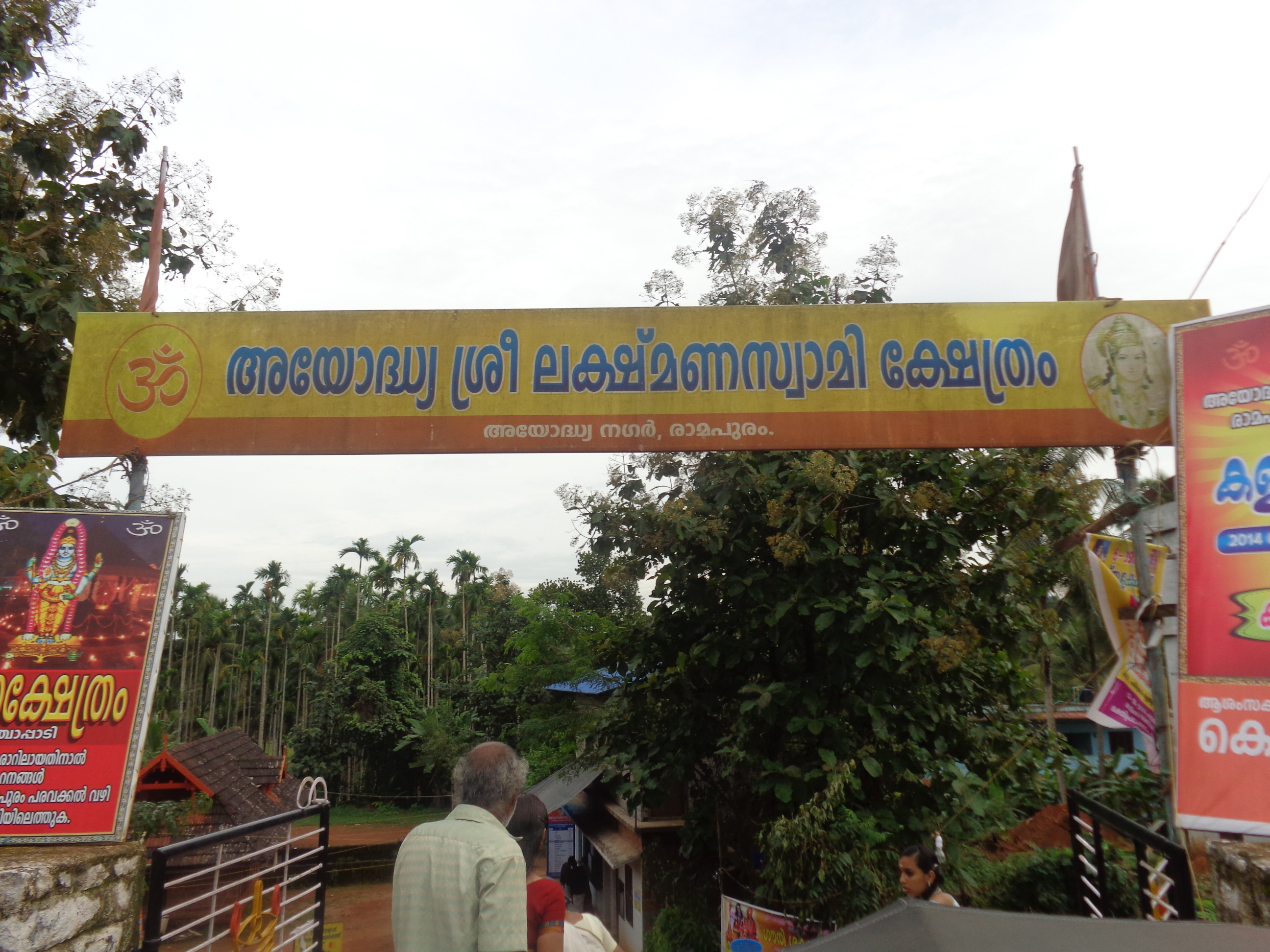 laksmana temple